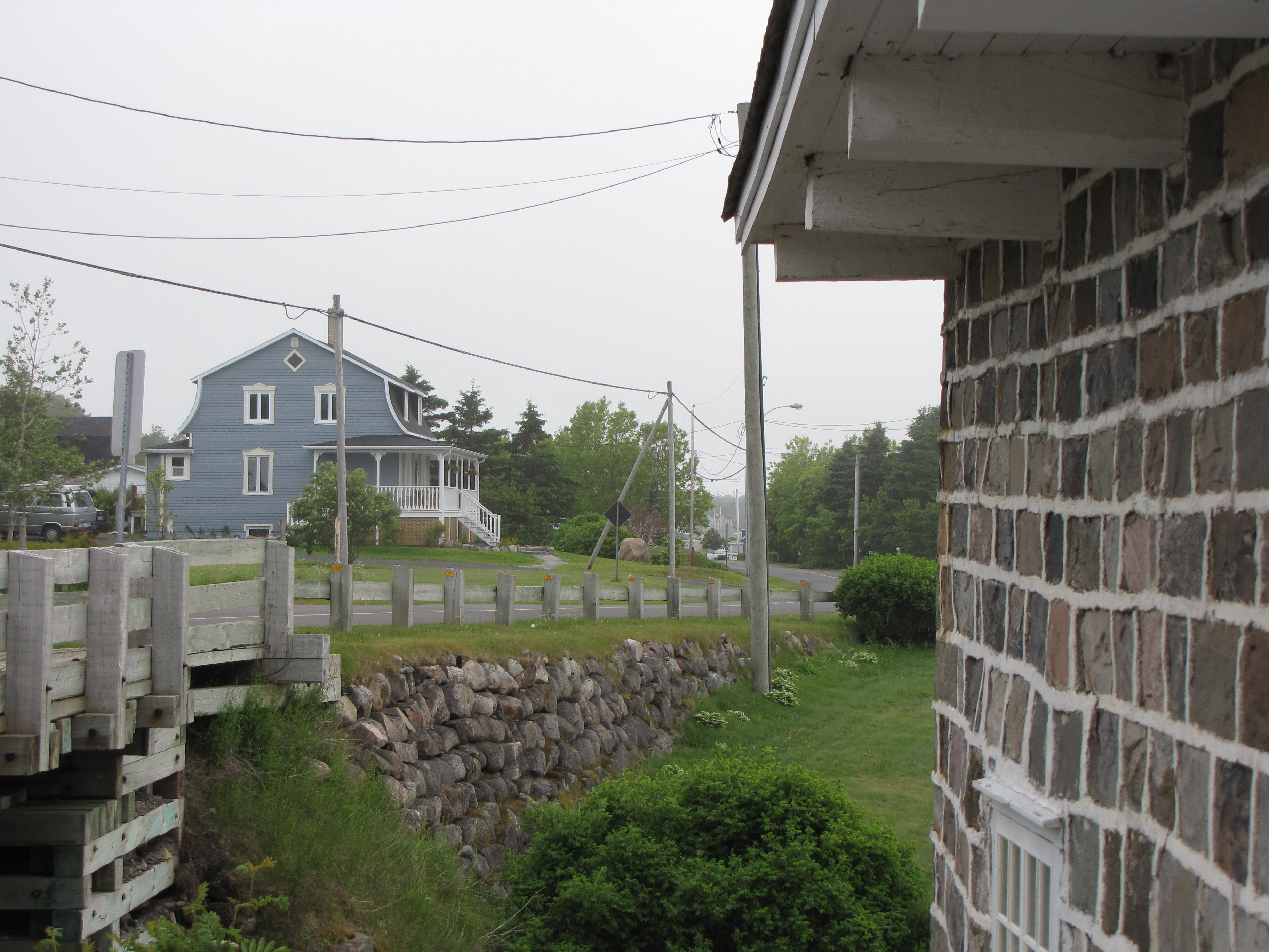 Maison du meunier du Moulin banal du ruisseau à la Loutre, situé à Sainte-Luce (Bas-Saint-Laurent, Québec). Moulin à eau; moulin à farine.